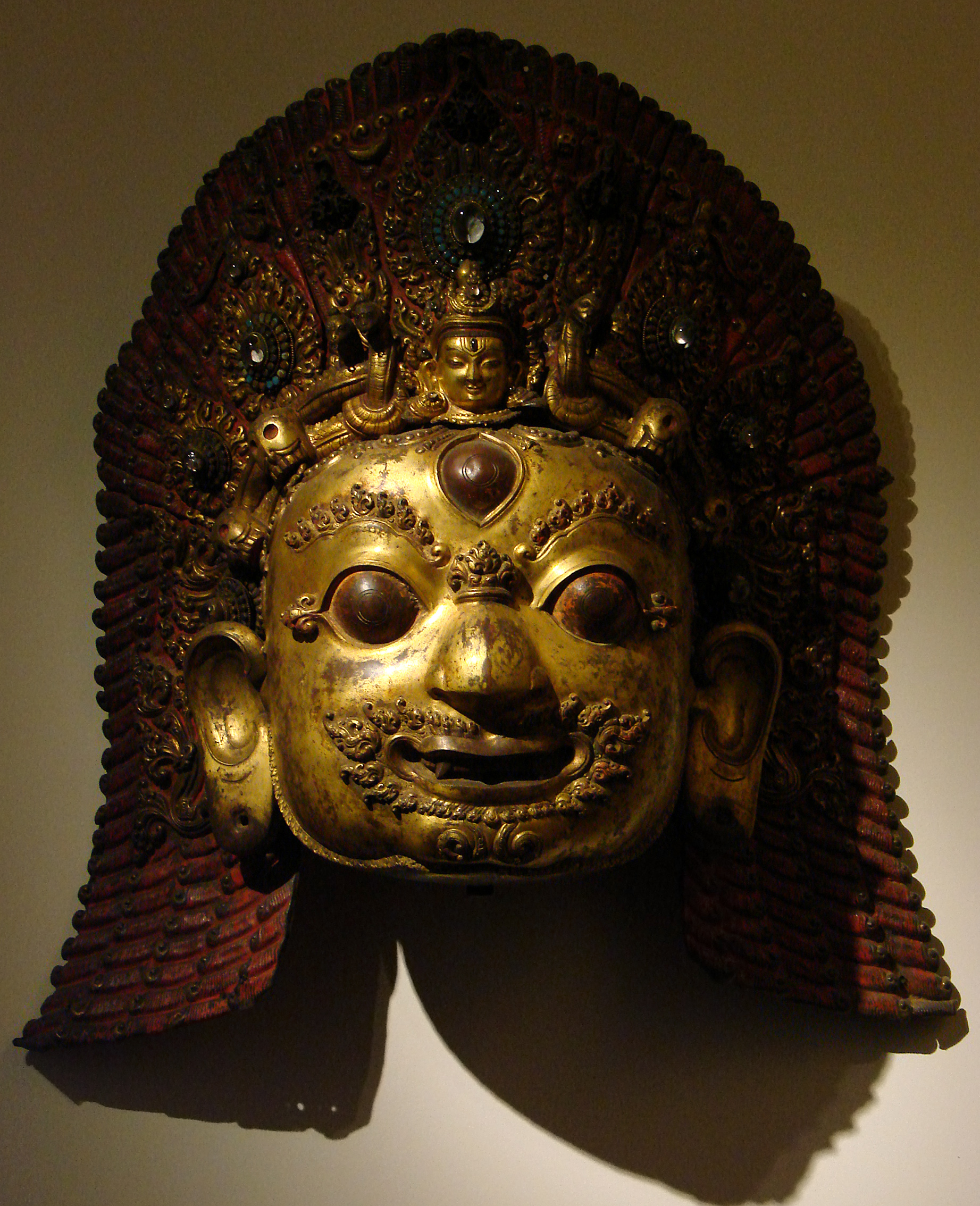 Masque représentant Shiva sous sa forme terrible: Bhairava.Cuivre doré et incrusté, 16ème-début 17ème siècle, Népal. Musée Guimet à Paris.